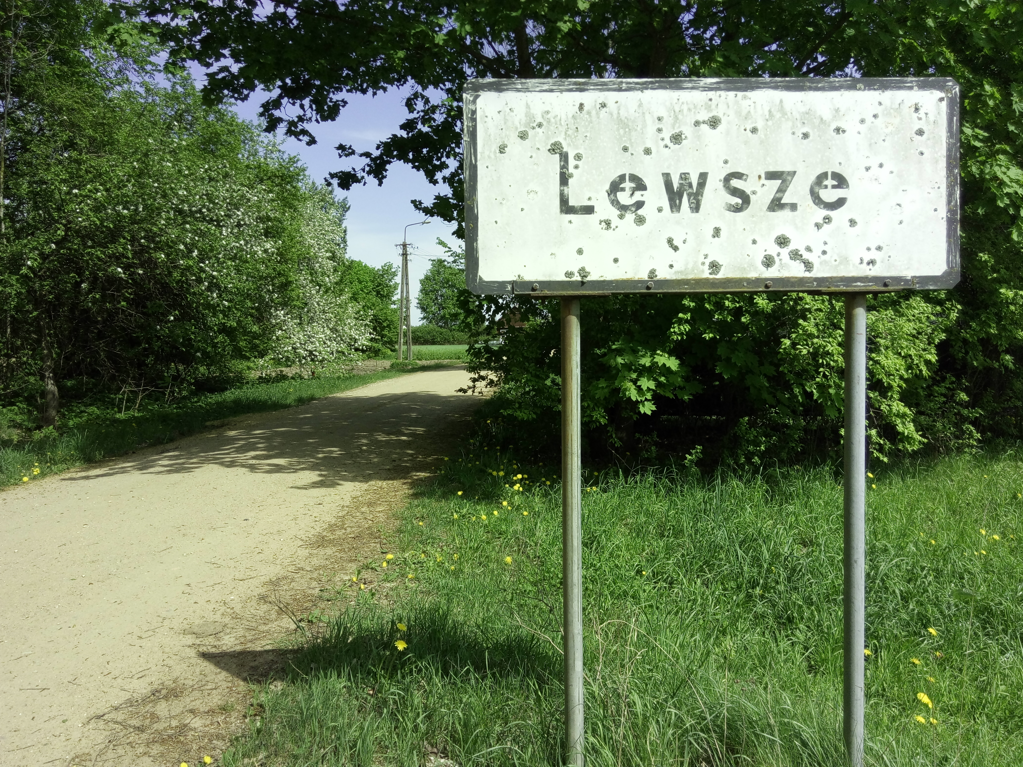 Wjazd do Lewszych ze starą tabliczką.